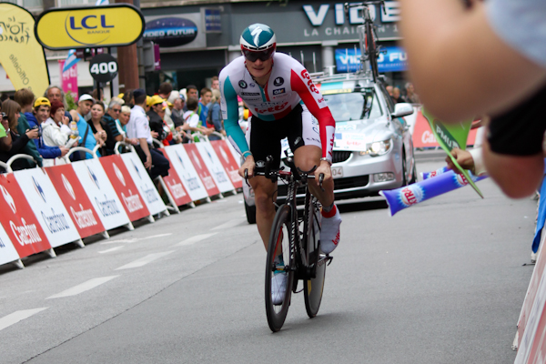 André Greipel